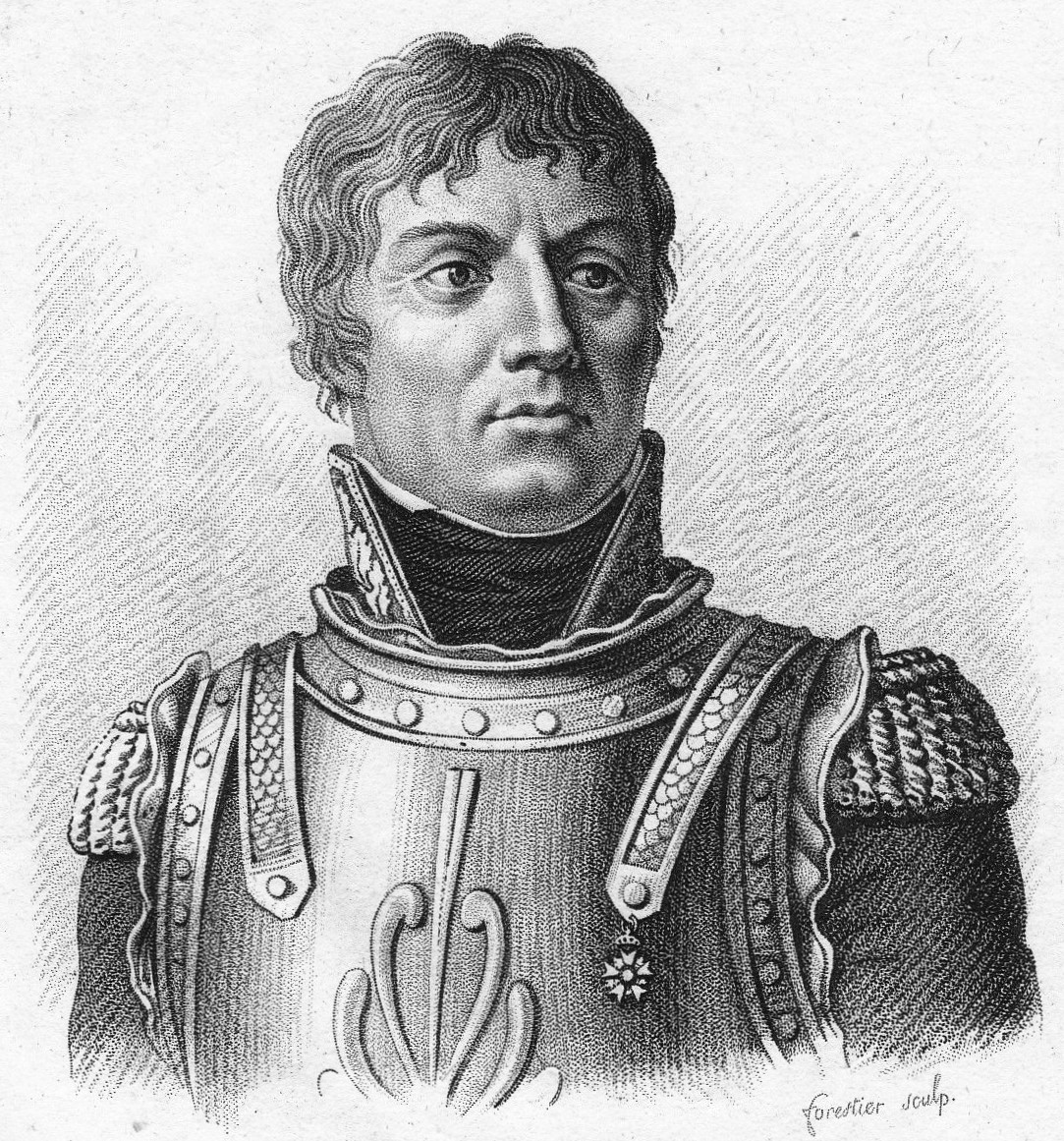 Général_Jean_Joseph_Ange_d'Hautpoul